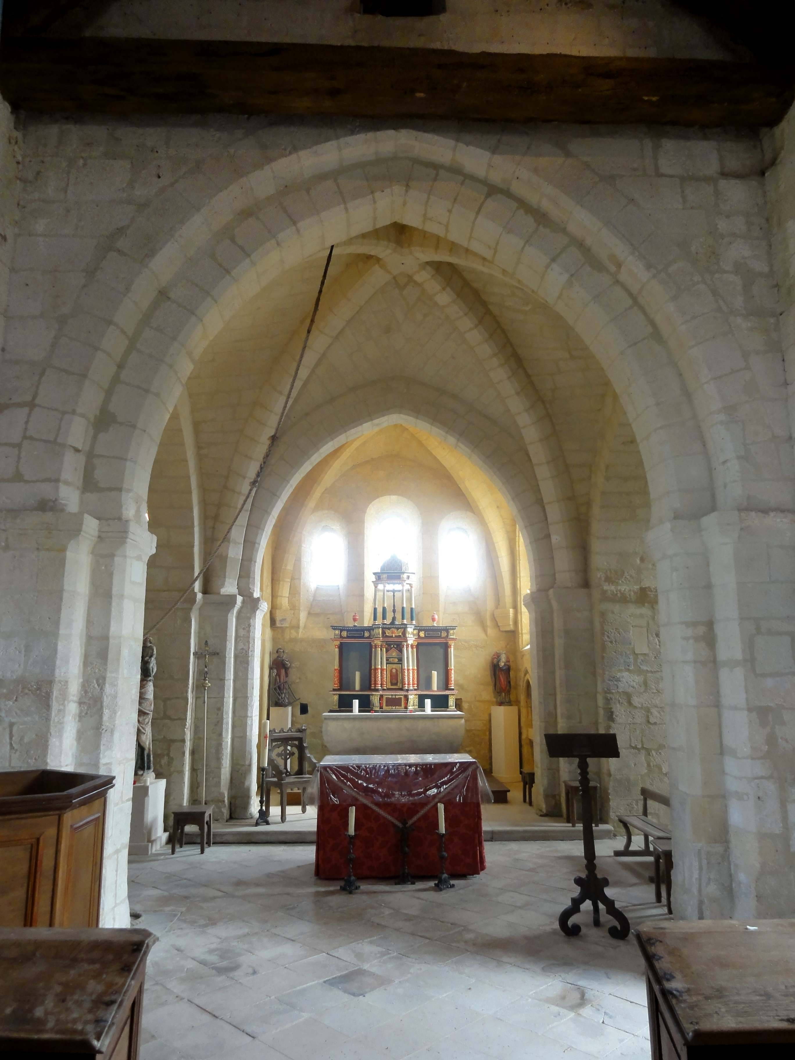 Nef, vue vers l'est.